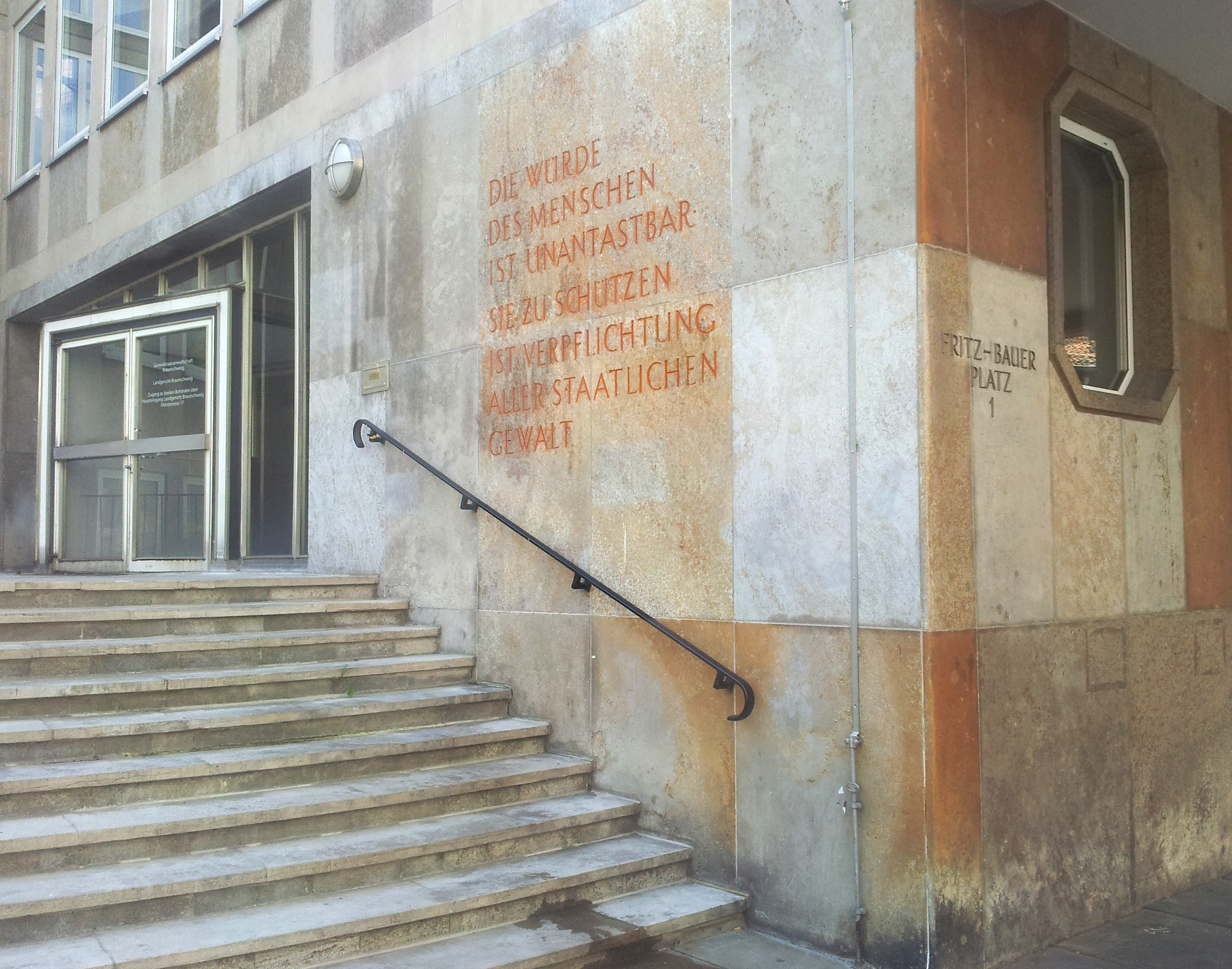 Als einzige Generalstaatsanwaltschaft trägt auf Veranlassung von Fritz Bauer die in Braunschweig den vollständigen Satz 1 des Artikels 1 des Grundgesetzes in seiner Fassade in Stein gemeißelt. Auf Initiative eines Arbeitskreises hat die Generalstaatsanwaltschaft Braunschweig seit 2012 die Adresse ´Fritz-Bauer-Platz 1´